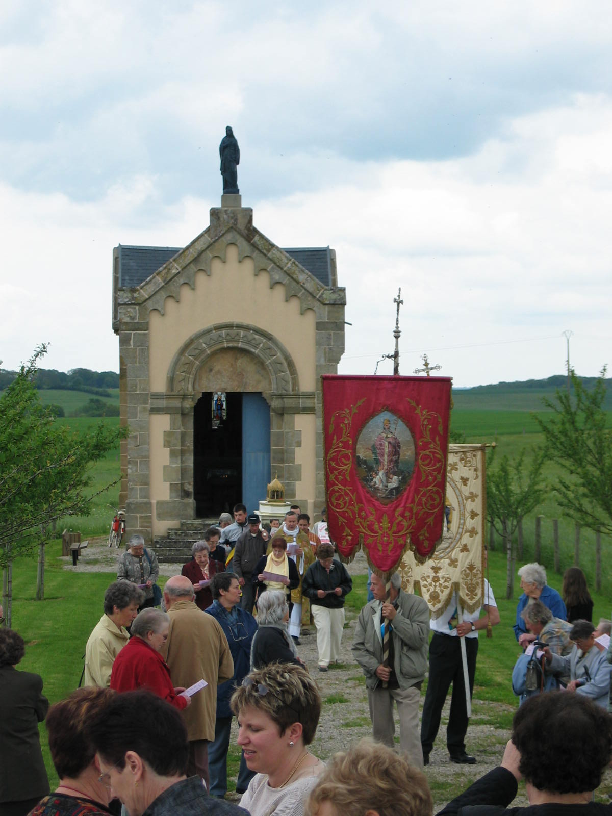 Pélérinage de Sainte Menne en mai sur la commune de Puzieux.